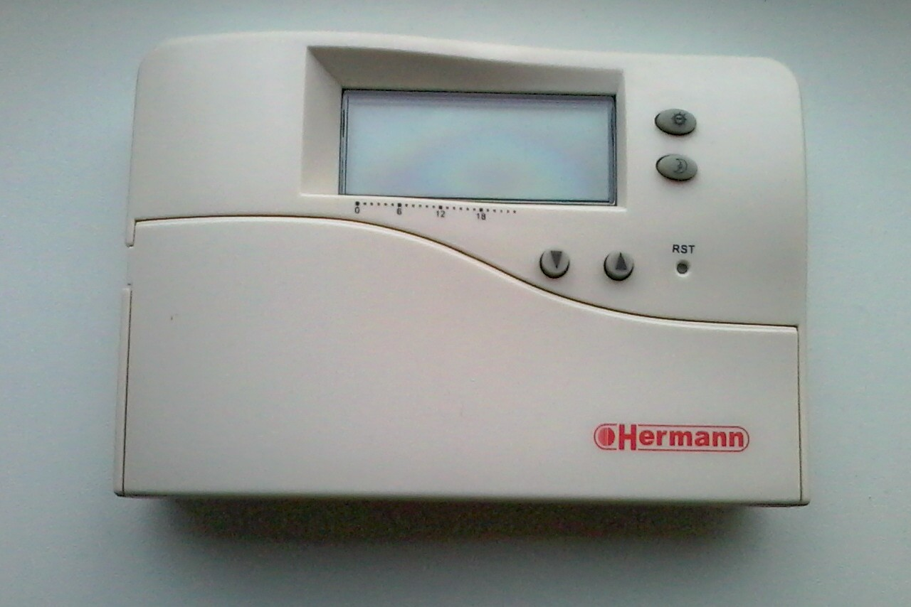 Знято мобілкою Самсунг